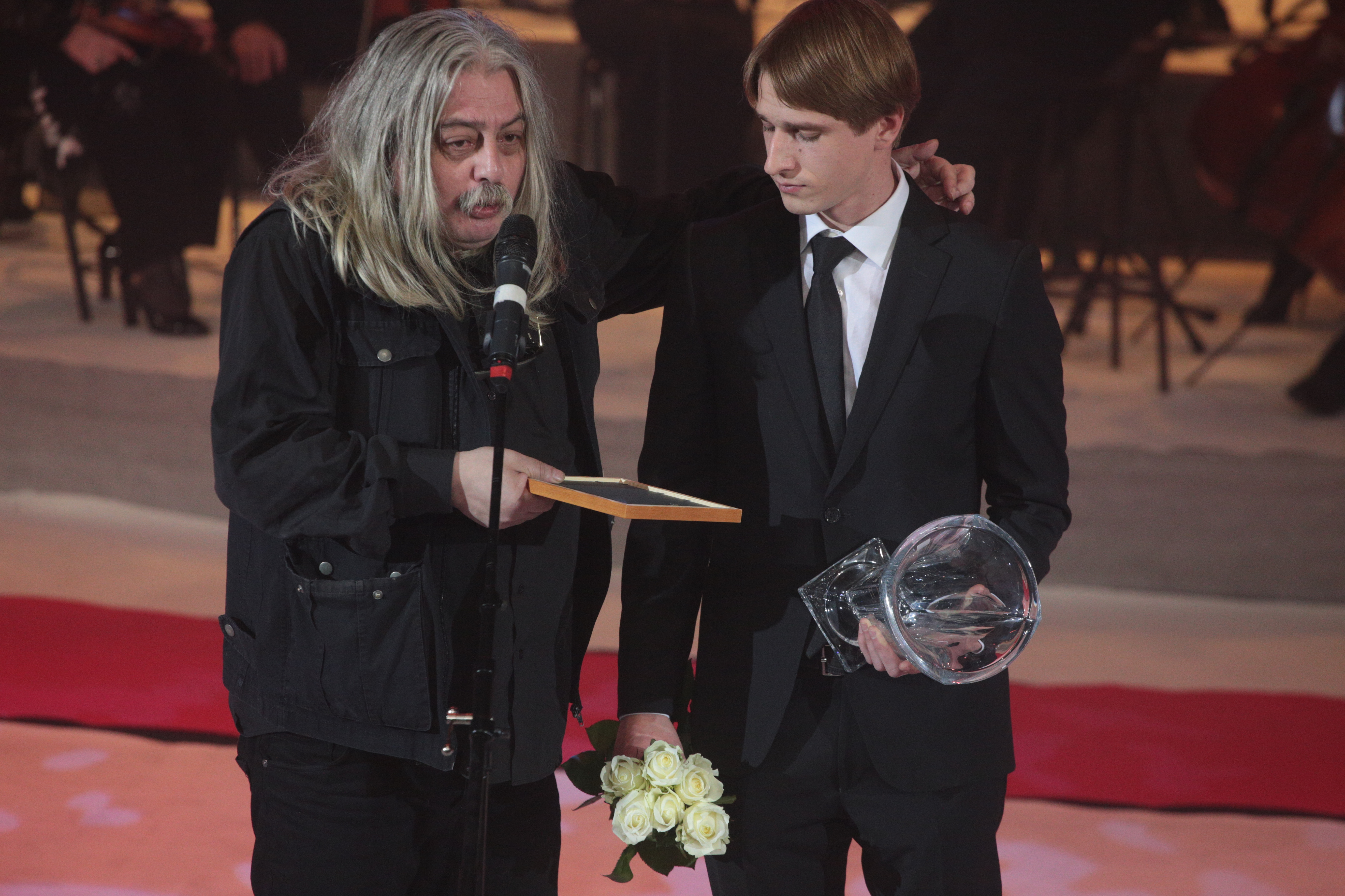 Награждение премией золотой софит